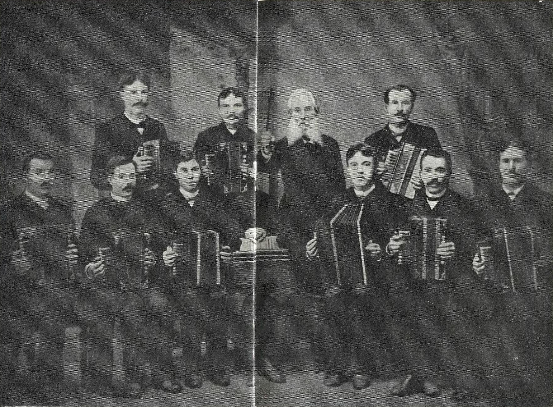 Фотография «Оркестра кружка любителей игры на хроматических гармониках». В центре Н. И. Белобородов